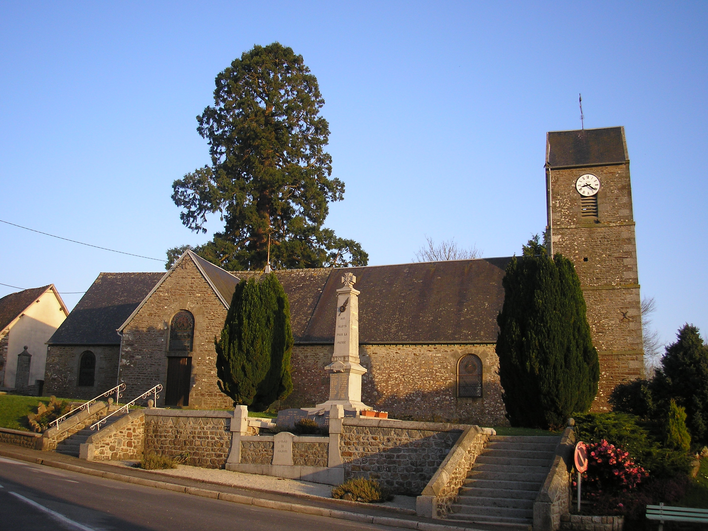 Saint-Clair-de-Halouze (Normandie, France). L'église Saint-Clair.